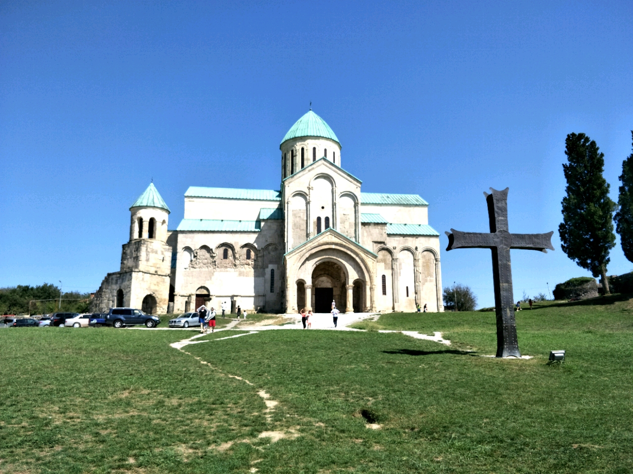 Храм Баграта - символ единства Грузии